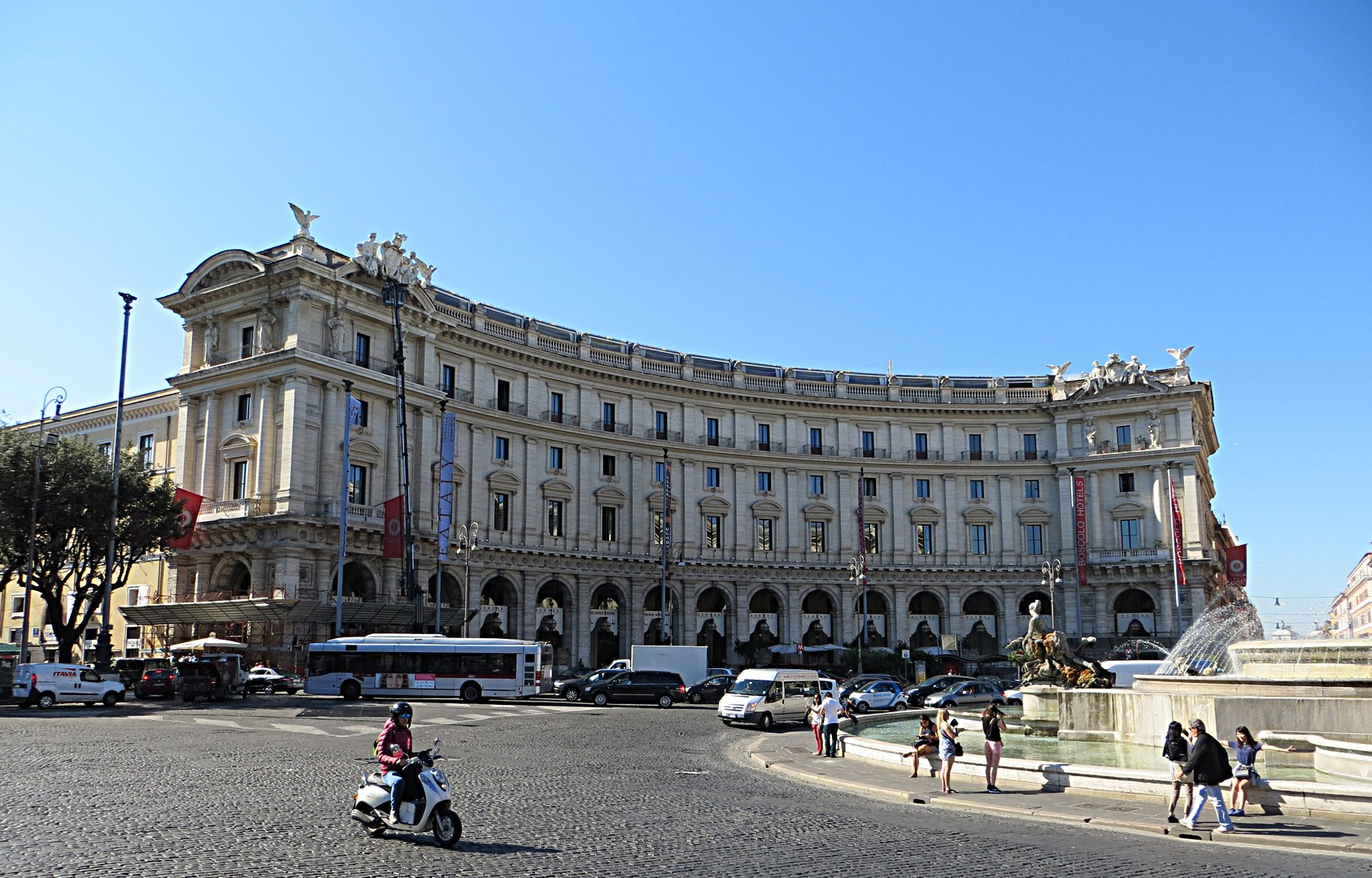 Piazza della Repubblica